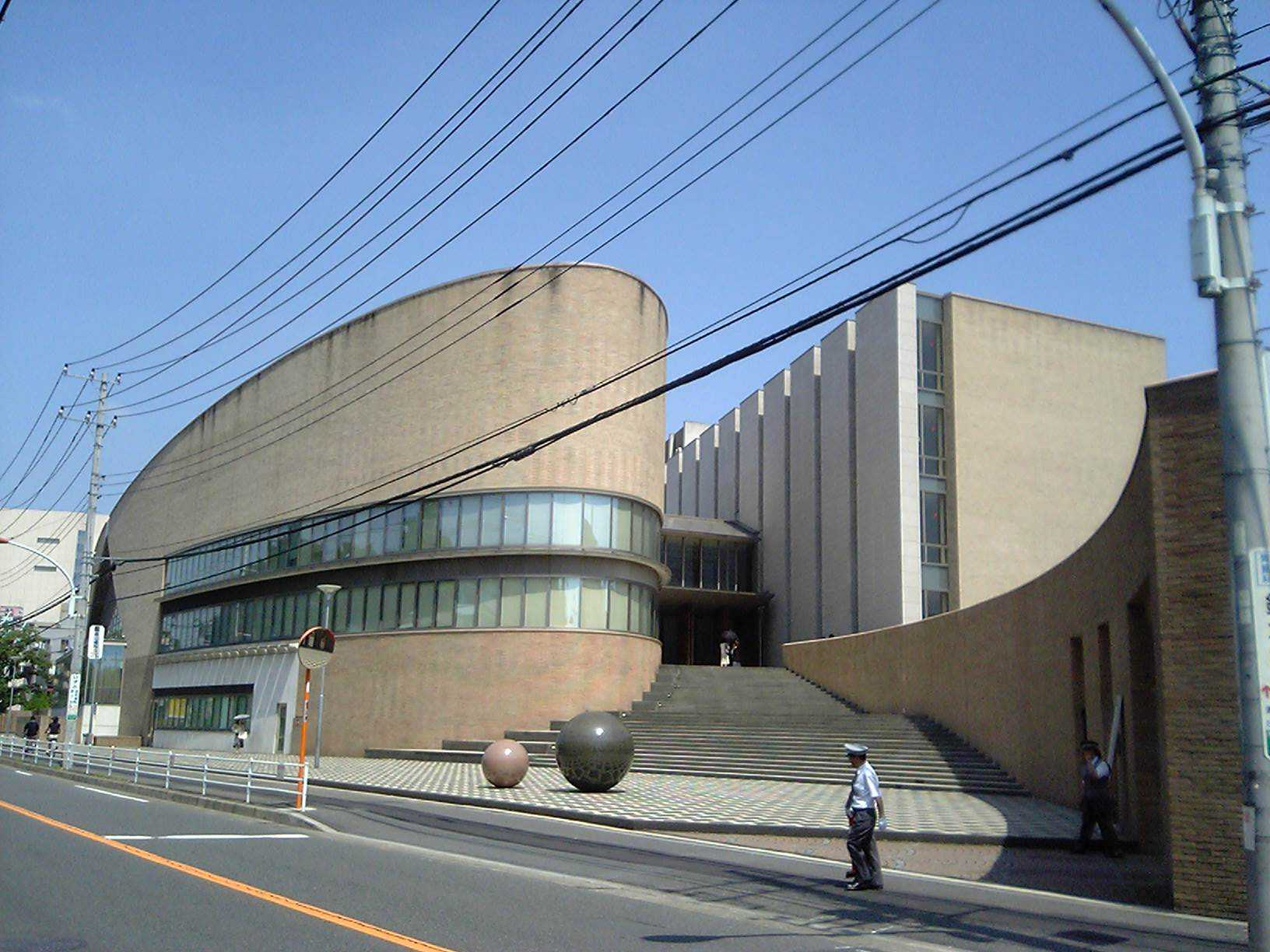 学校法人洗足学園（川崎市高津区）